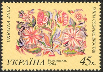 Поштова марка України 2002 з роботою Ганни Собачко-Шостак "Ромашки"